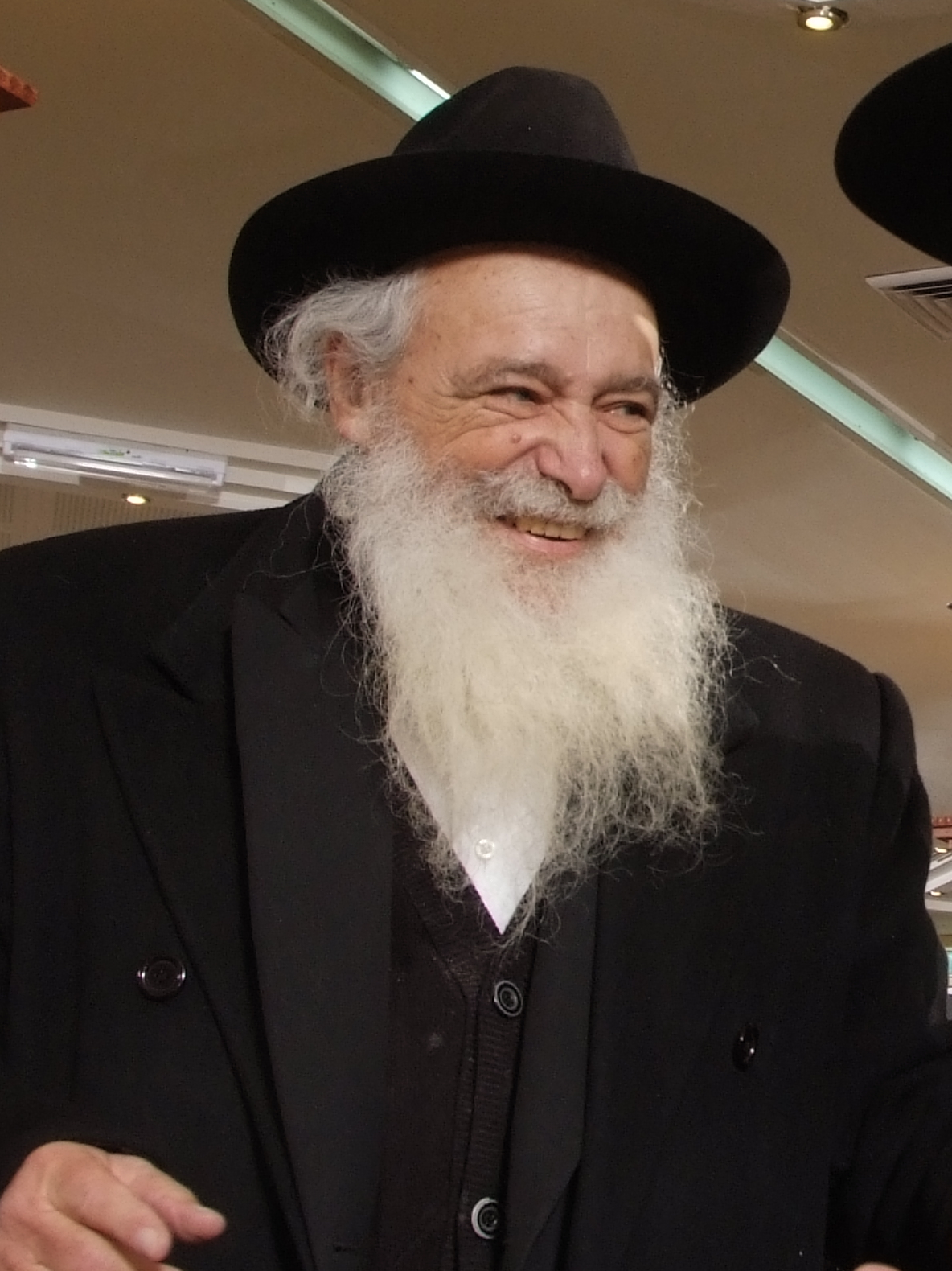 הרב אביגדור נבנצל רבה של ירושלים העתיקה